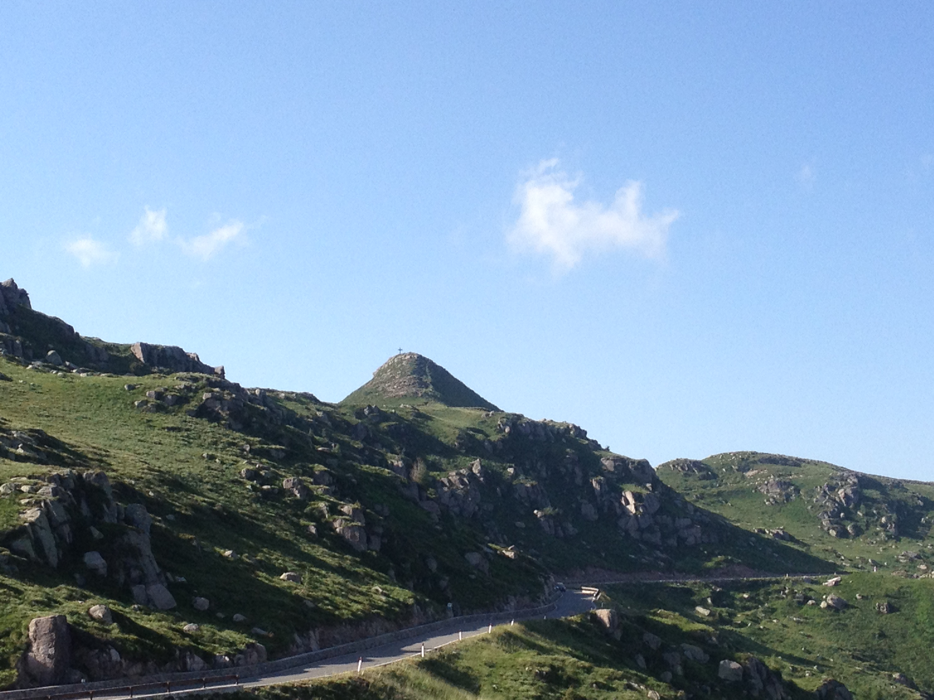 Sella Auccia (vista dai piedi del Dosso dei galli)